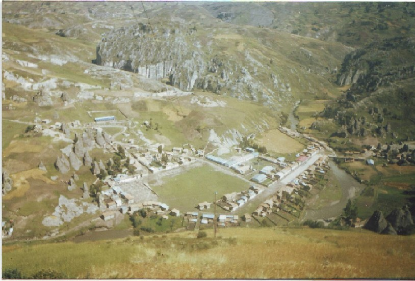 La foto corresponde al enero del 2009.